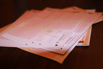 Tickety na hru Sportka a Šance